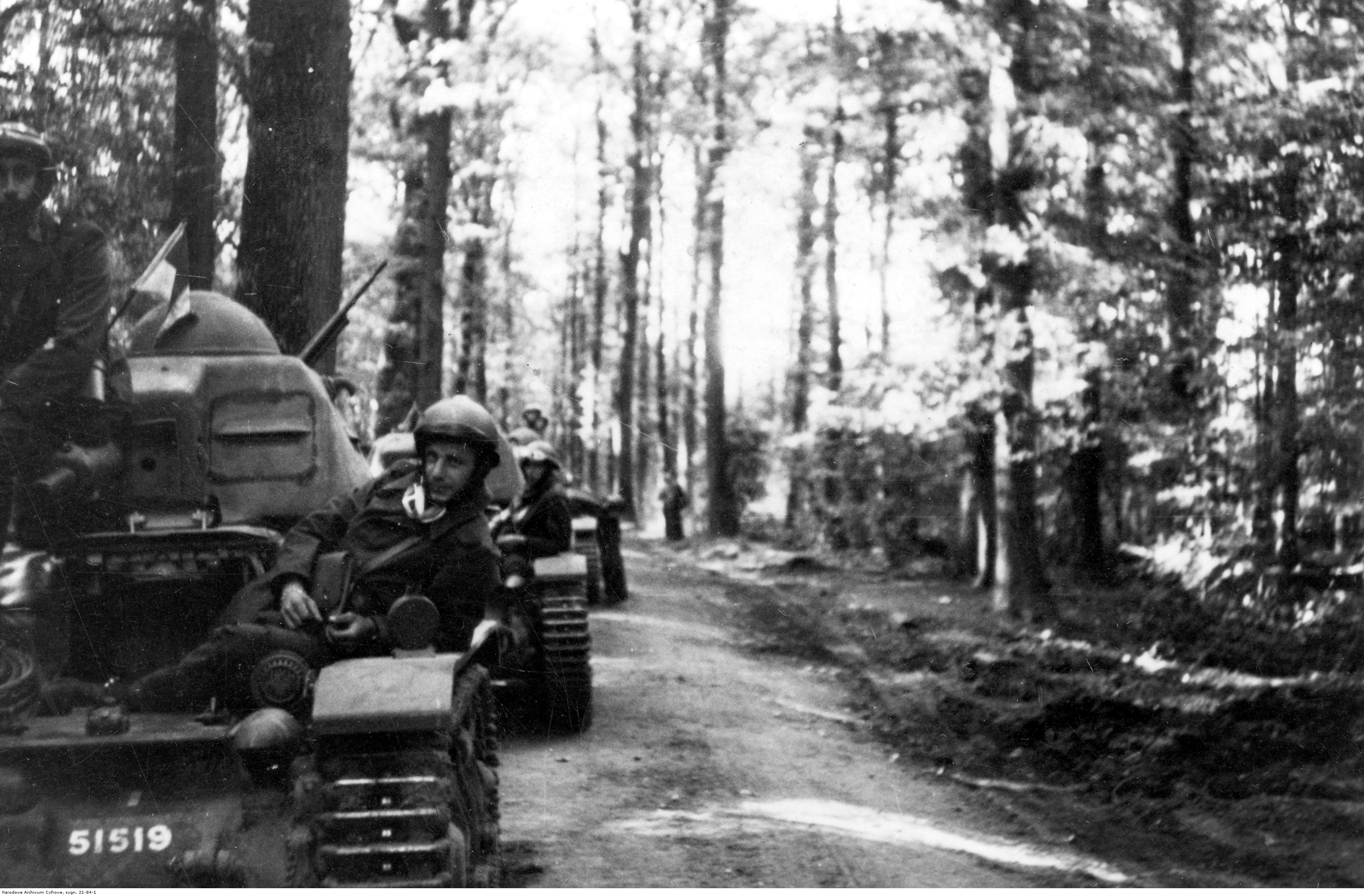 Polscy czołgiści w czołgach Renault R-35.